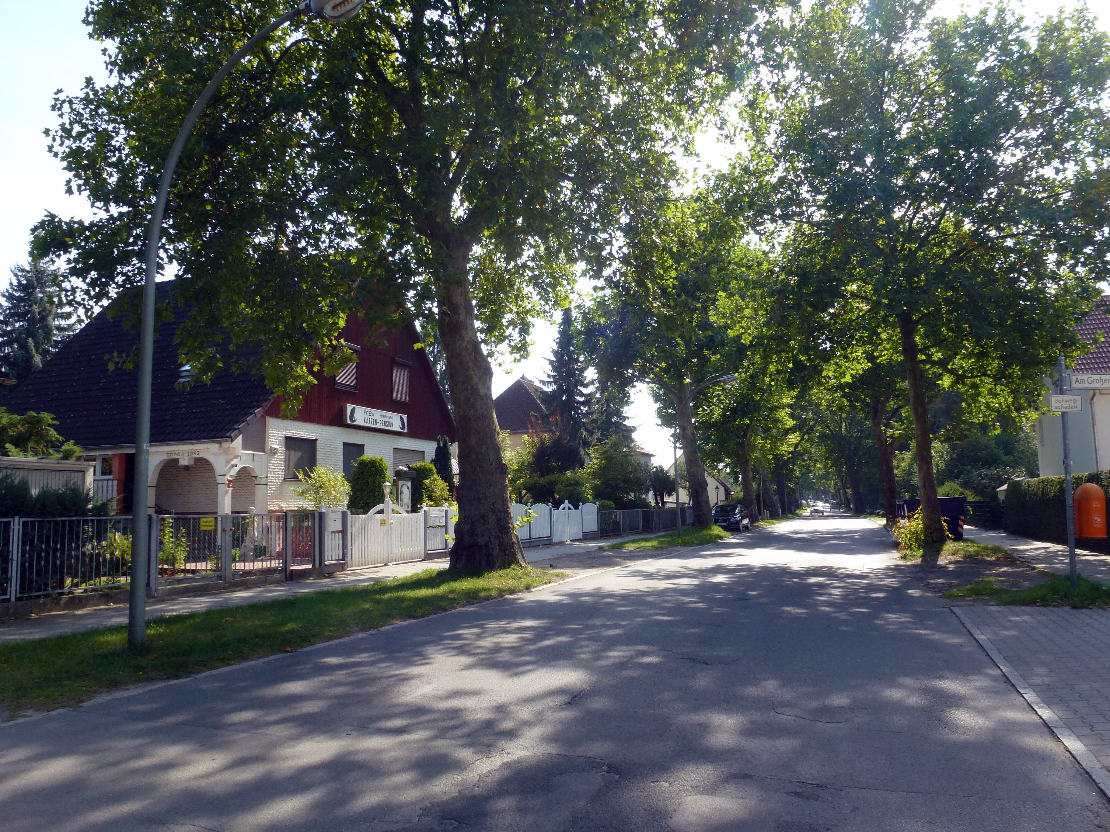 Berlin-Rudow Waßmannsdorfer Chaussee